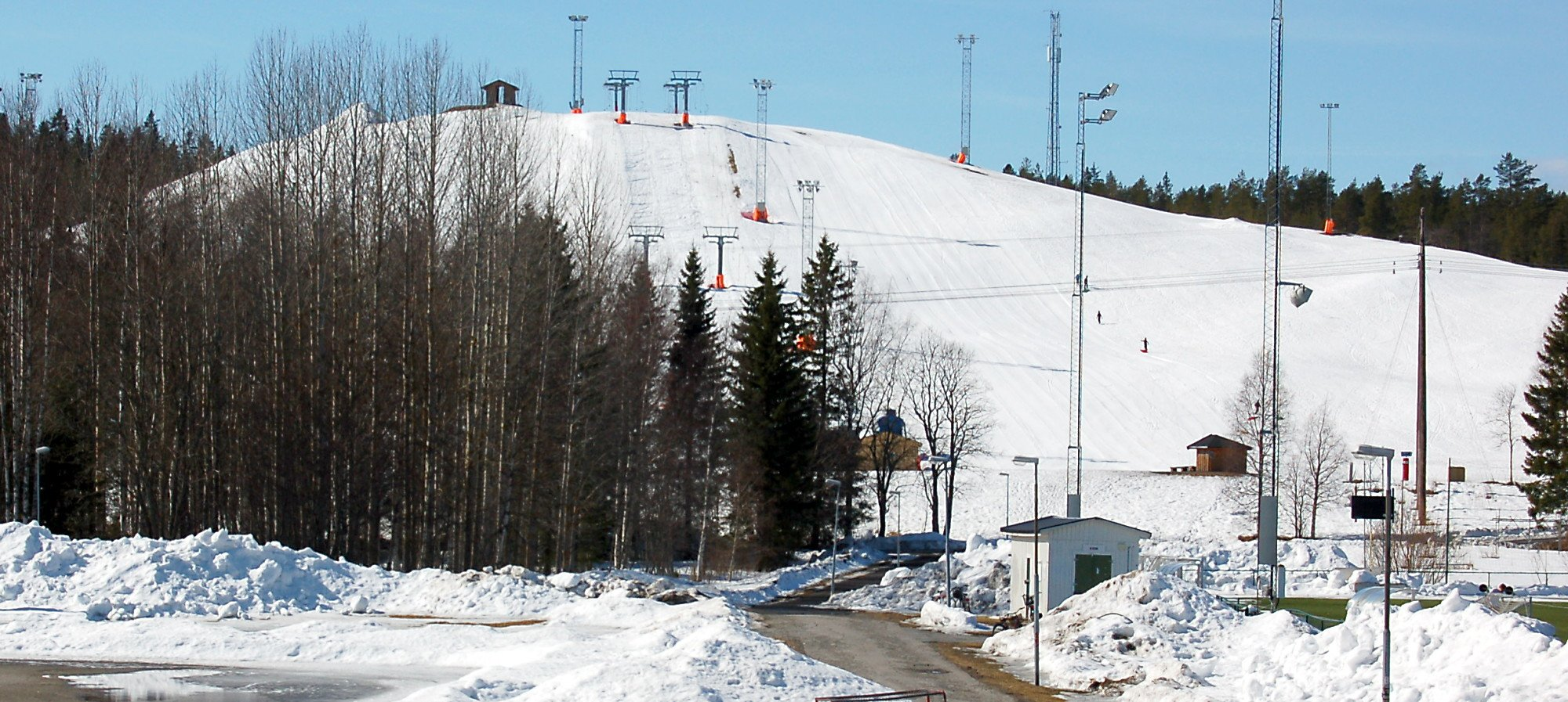 Bräntbergets slalombacke, Umeå.